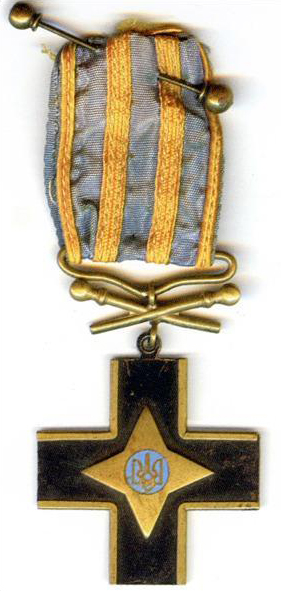 Орден Залізного Хреста (УНР)